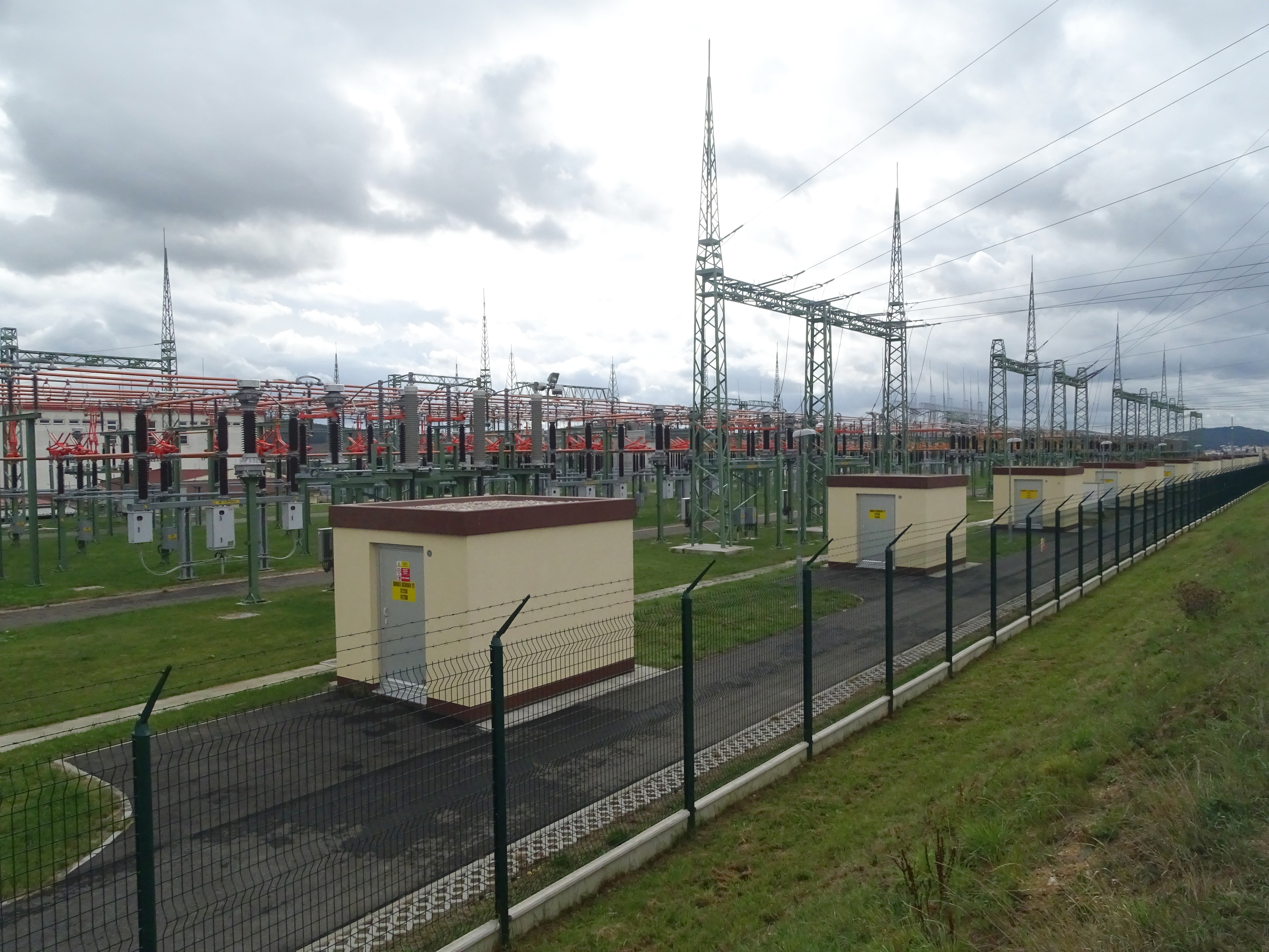 Rozvodna Přeštice patří mezi nejvýznamnější rozvodny české energetické přenosové soustavy. Nachází se mezi Dolní Lukavicí a Přešticemi.